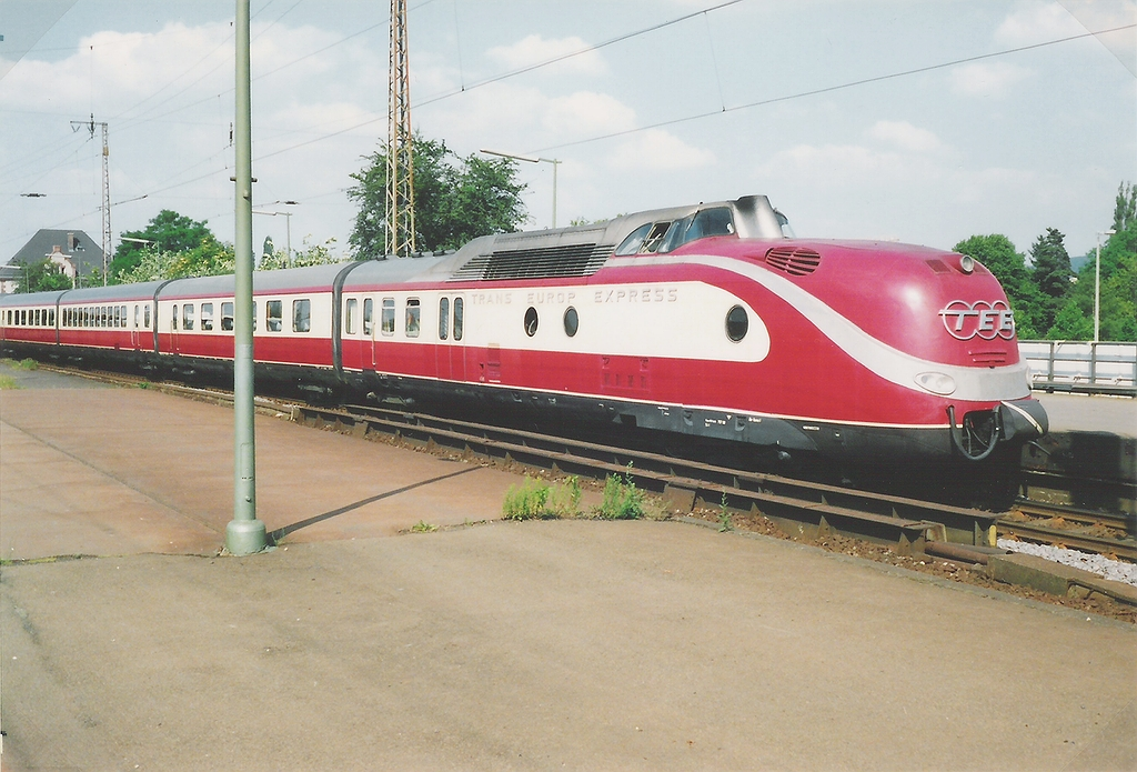 Eisenbahnfest zur 1200-Jahr-Feier der Stadt Herford, 17.-18.Juni 1989